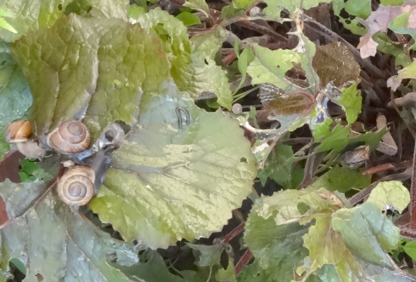 gołożer spowodowany przez .ślimaki